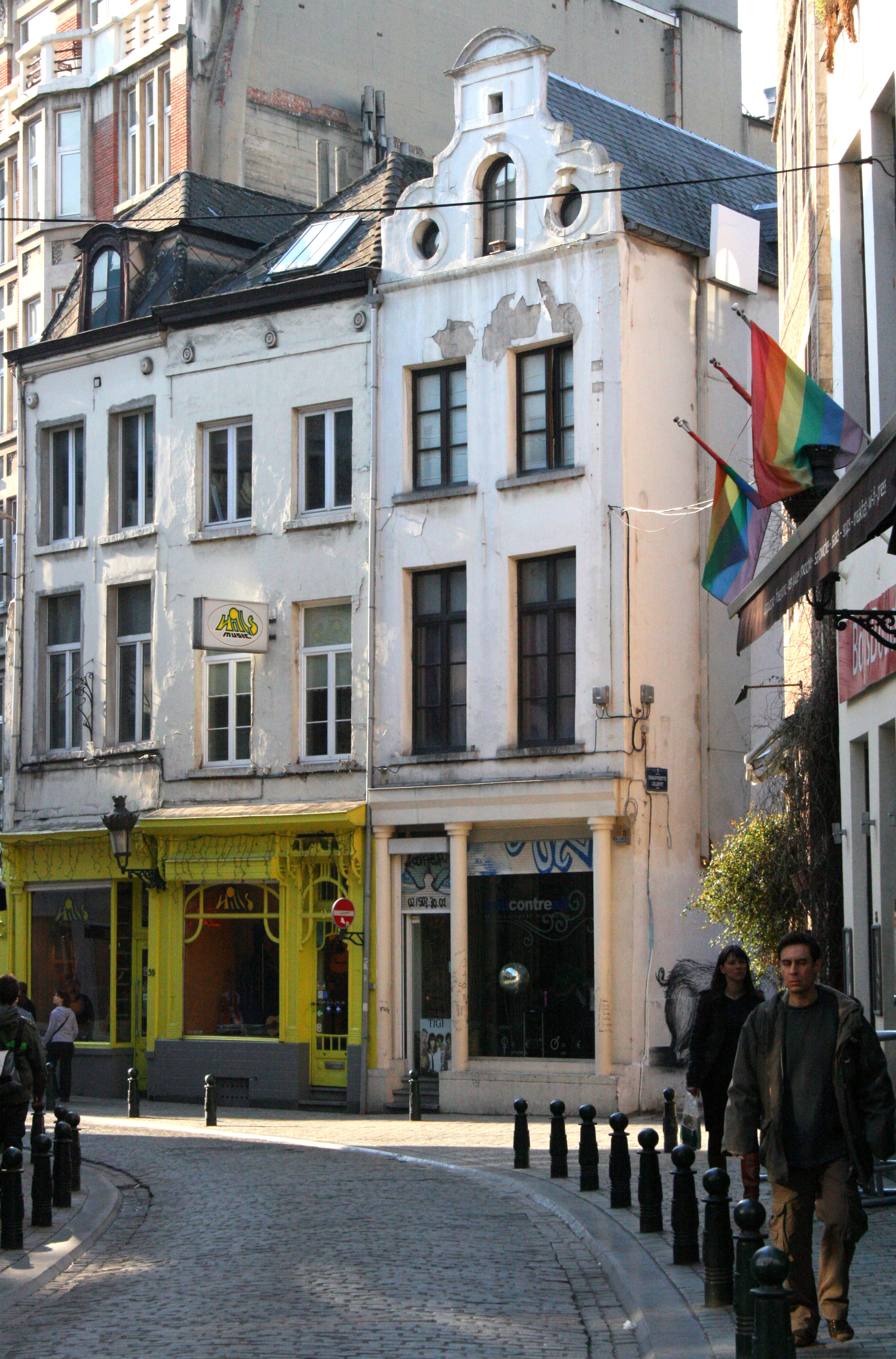 Rue du Marché au Charbon, Bruxelles (Belgique)